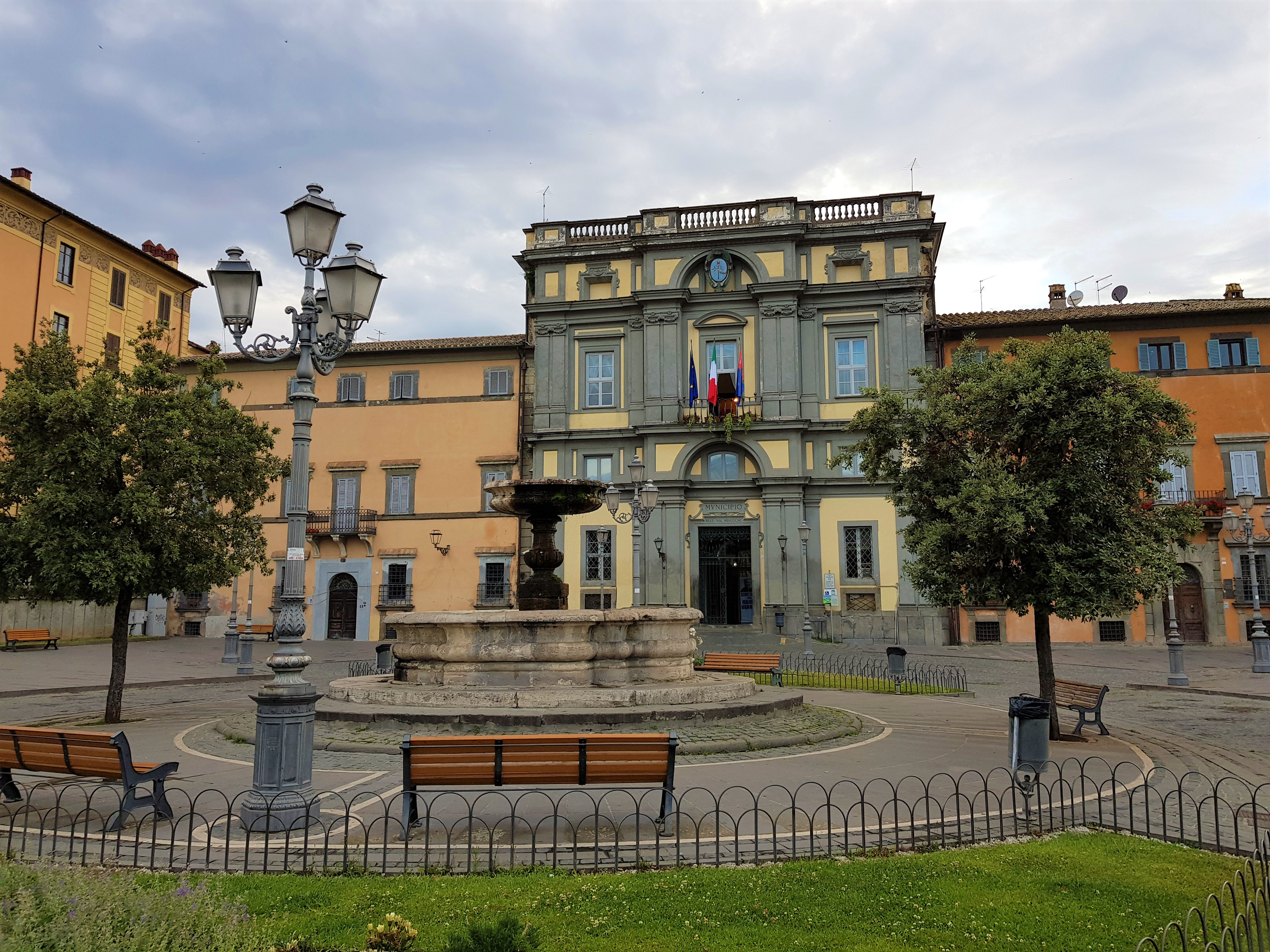 La piazza del municipio.